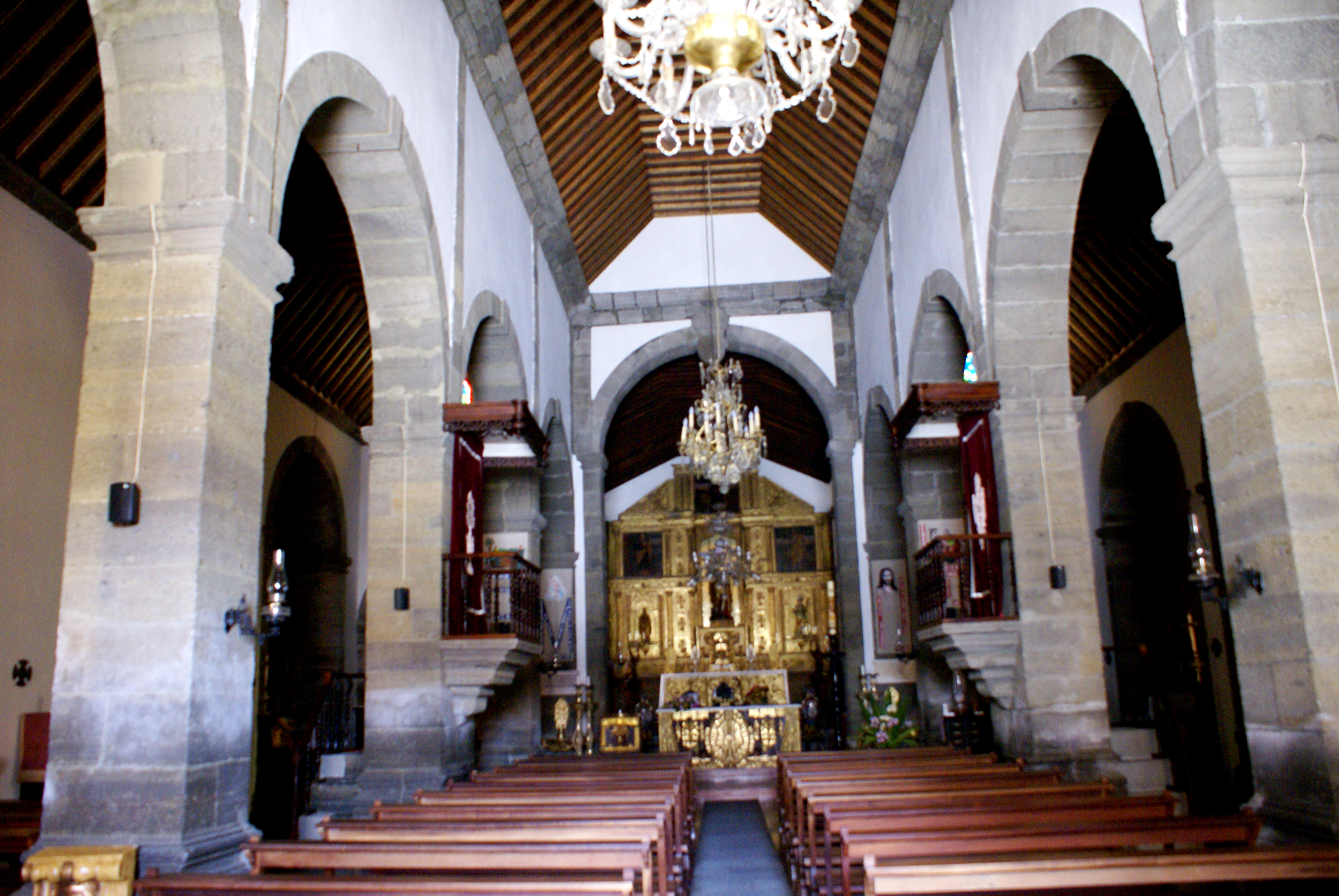 Igreja de São Jorge, nave central, Velas, Ilha de São Jorge, Açores